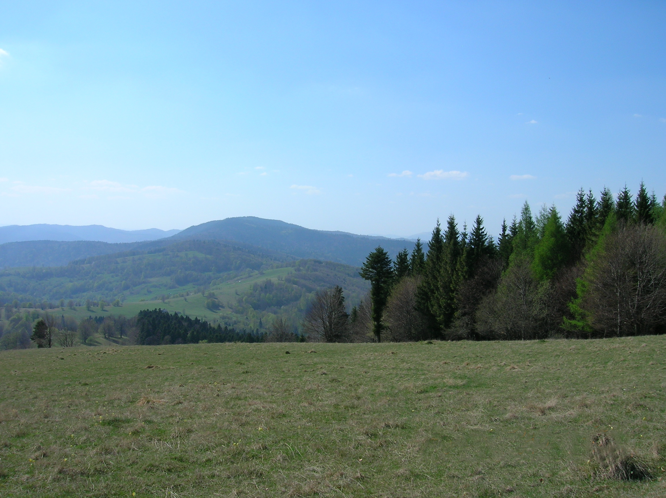 Jud. Neamţ, Munţii Stânişoarei, Parcul Natural Vânători Neamţ, de la nivelul Poienii Ciungi